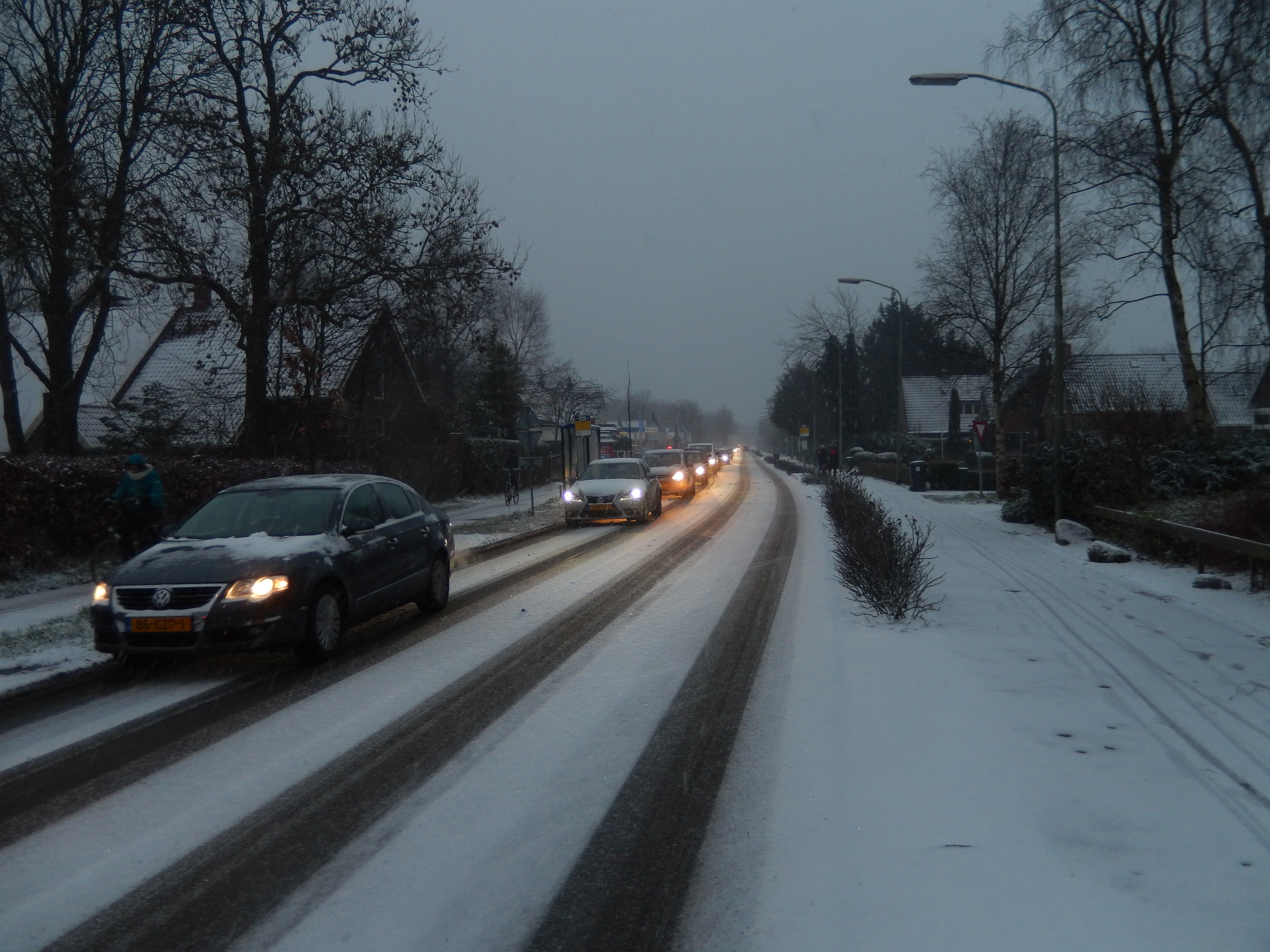 IJzel en sneeuw in Groningen (Eelderwolde, Groningerstraat) op 4 januari 2016.